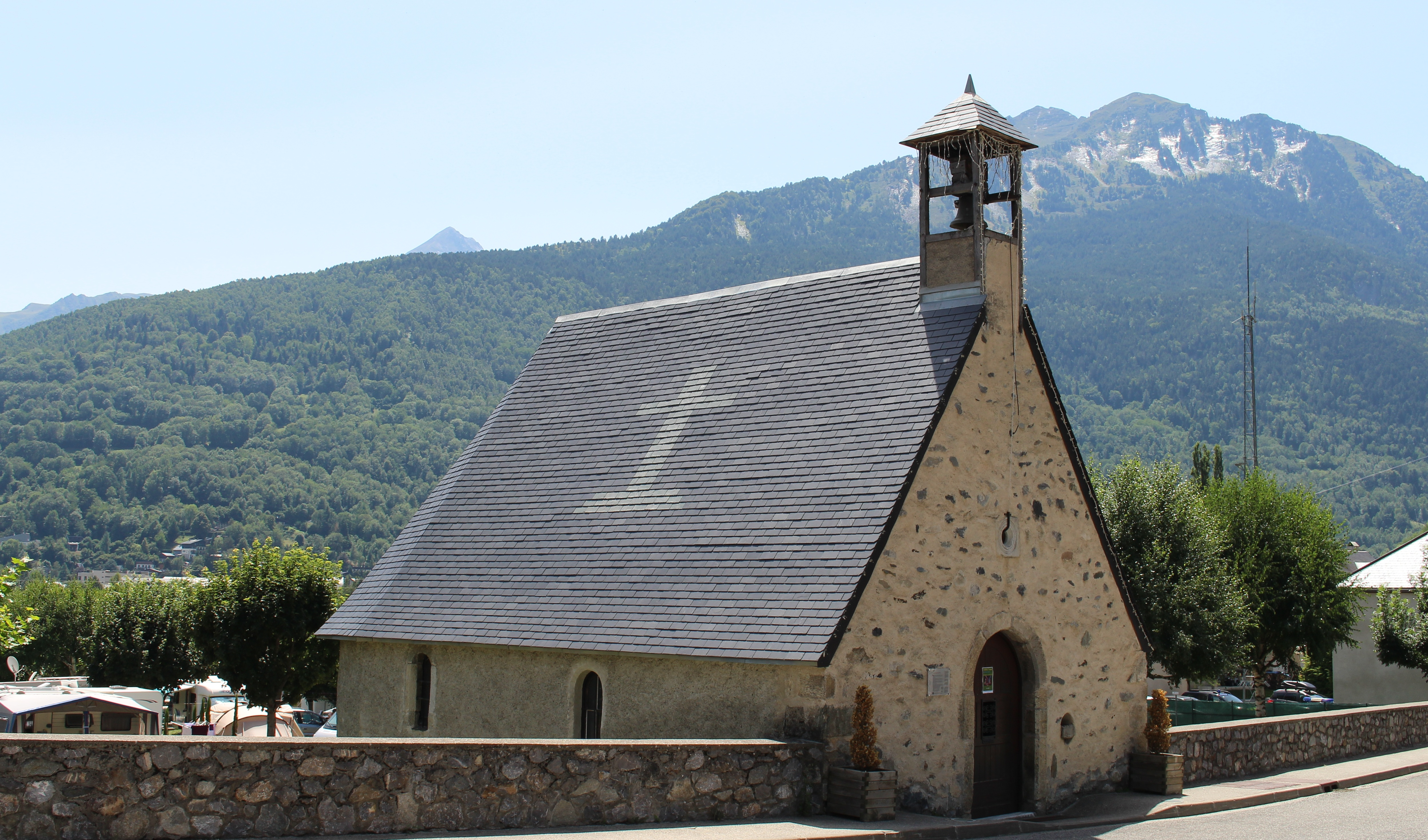 Chapelle Saint-Jacques de Vignec (Hautes-Pyrénées)